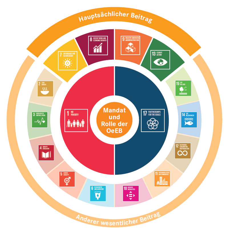 Beitrag der OeEB zu den SDGs - bessere Qualität